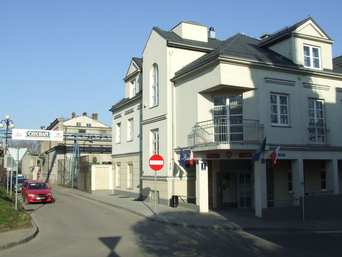 Ciechanów, ul. Wodna 1 - nowy urząd miasta